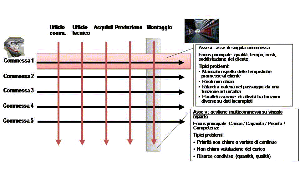 Con il setsuban kanri si gestiscono le attività lungo una duplice direttrice